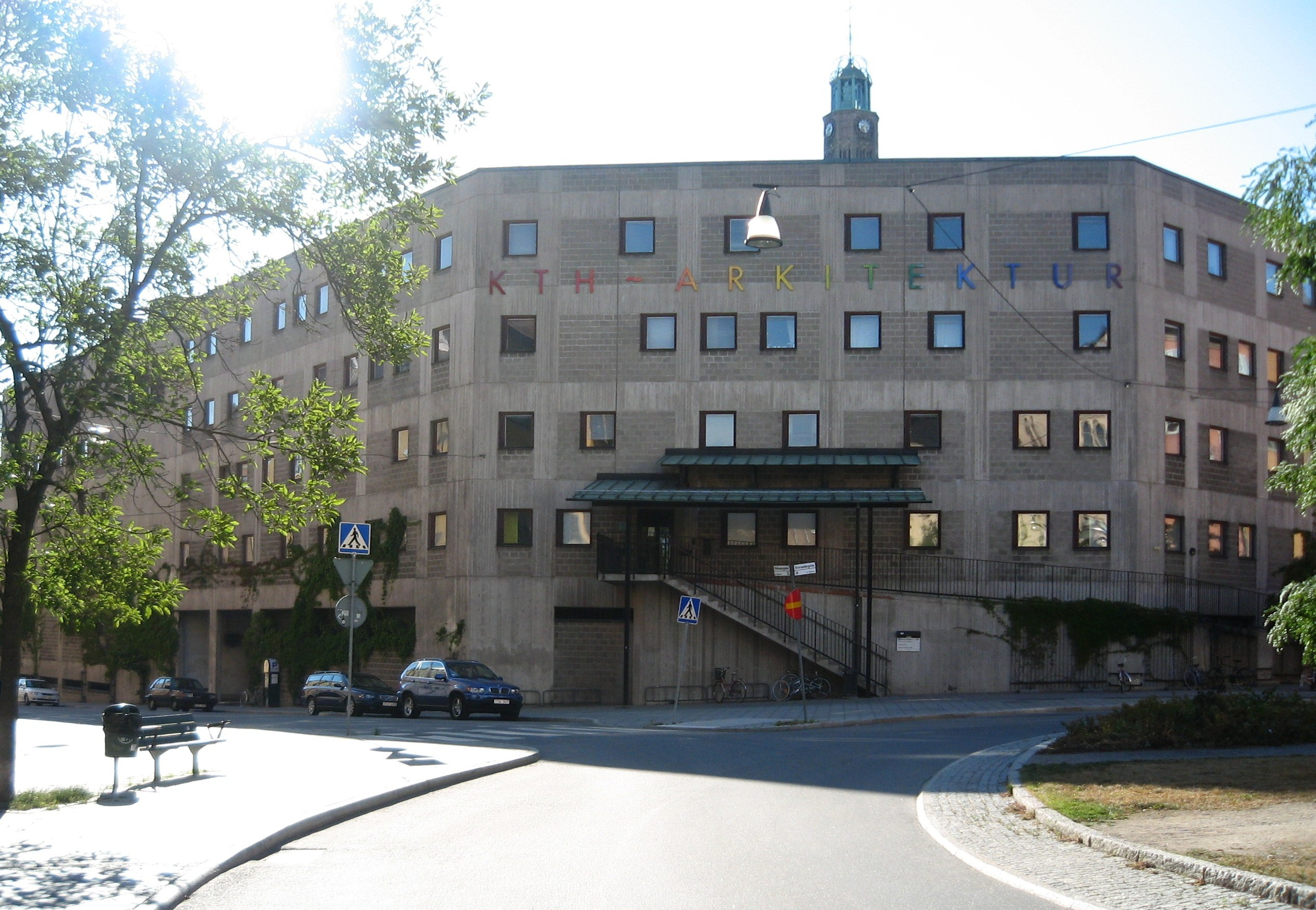 KTH Arkitektur, Östermalm